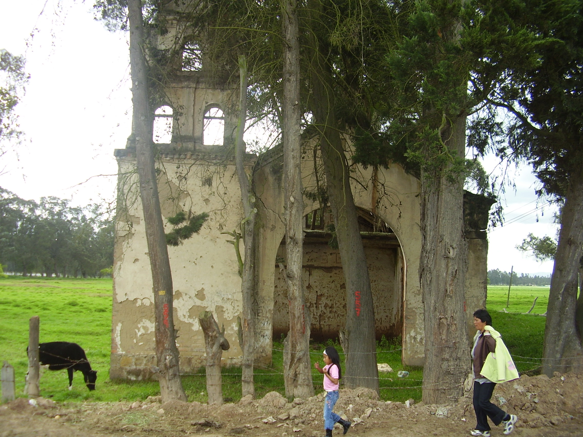 Capilla el Humilladero Cruz Verde; Iglesia abandonada en la vereda de San Bernardino, se observa la similitud que tiene con la iglesia de San Bernardino.